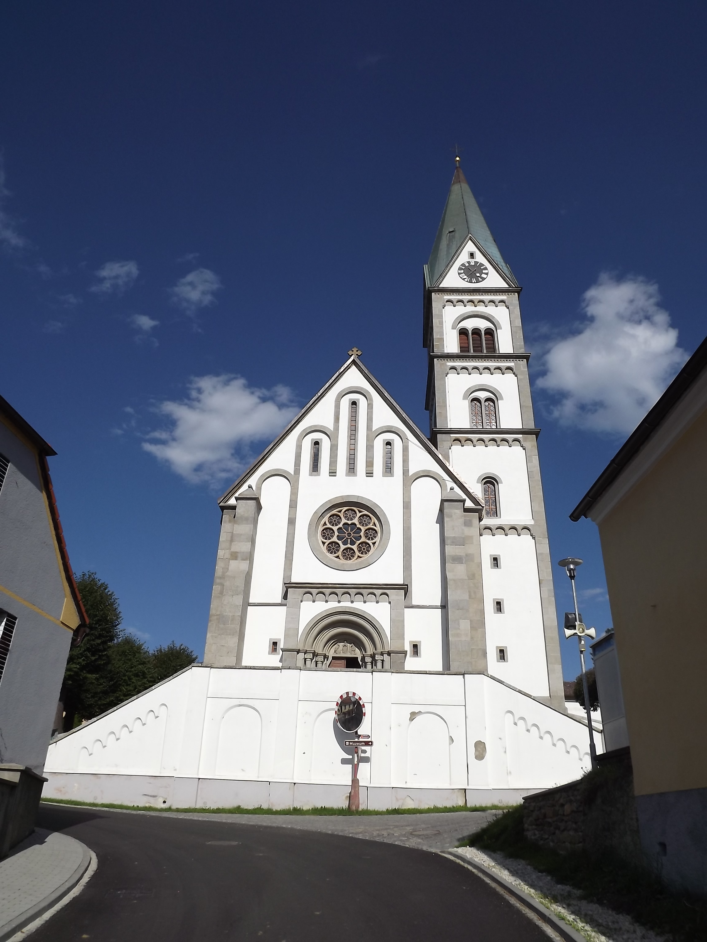 Kostel Proměnění Páně